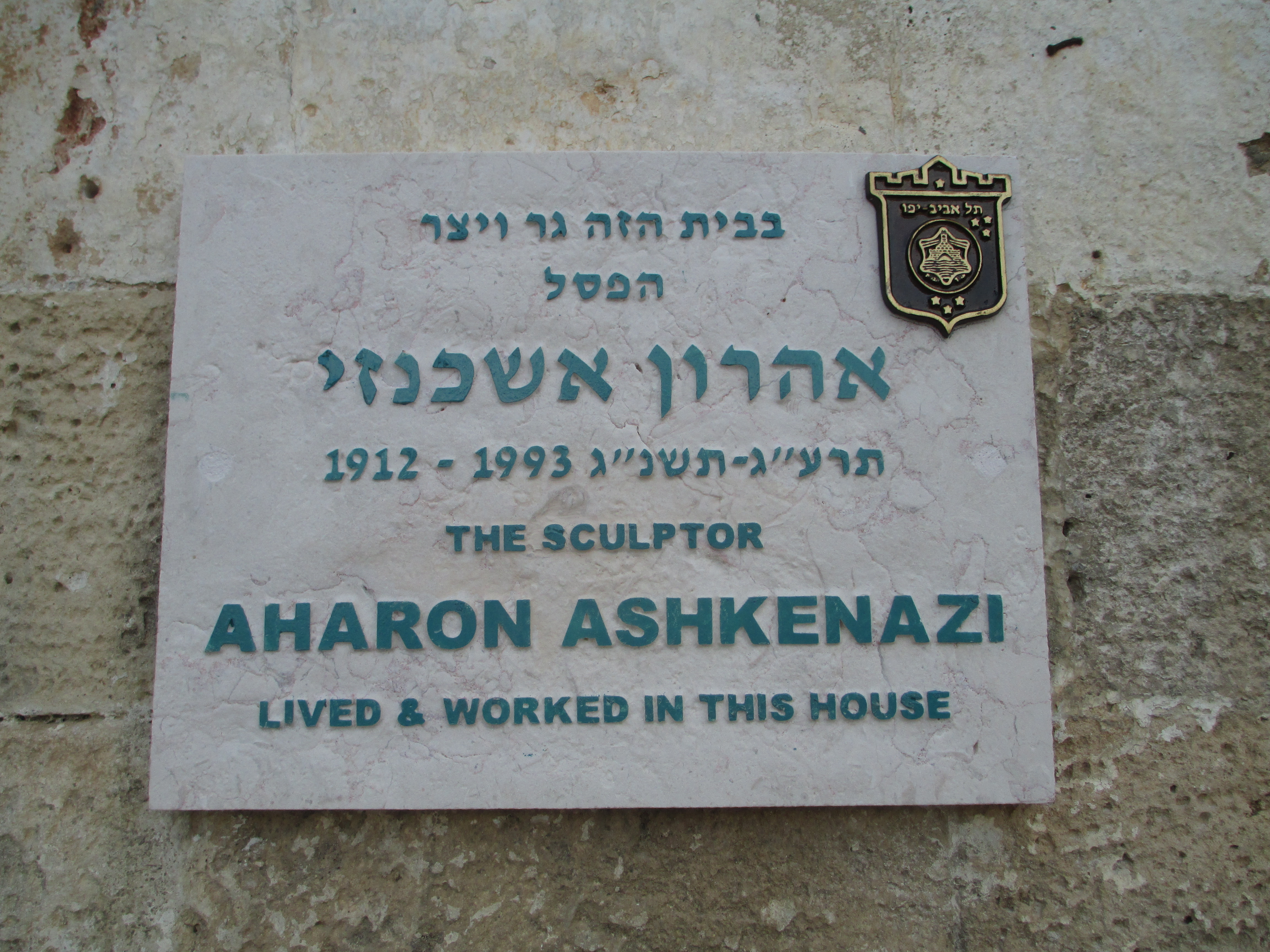 לוחית זיכרון לפסל אהרון אשכנזי בכיכר קדומים 1 ביפו העתיקה